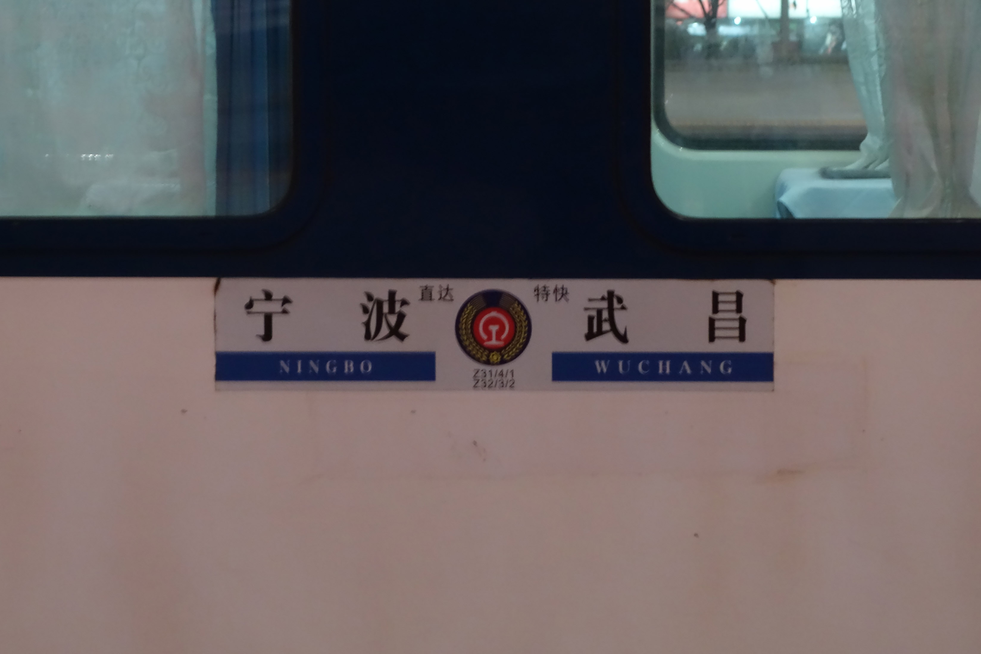 Z31次列车水纸